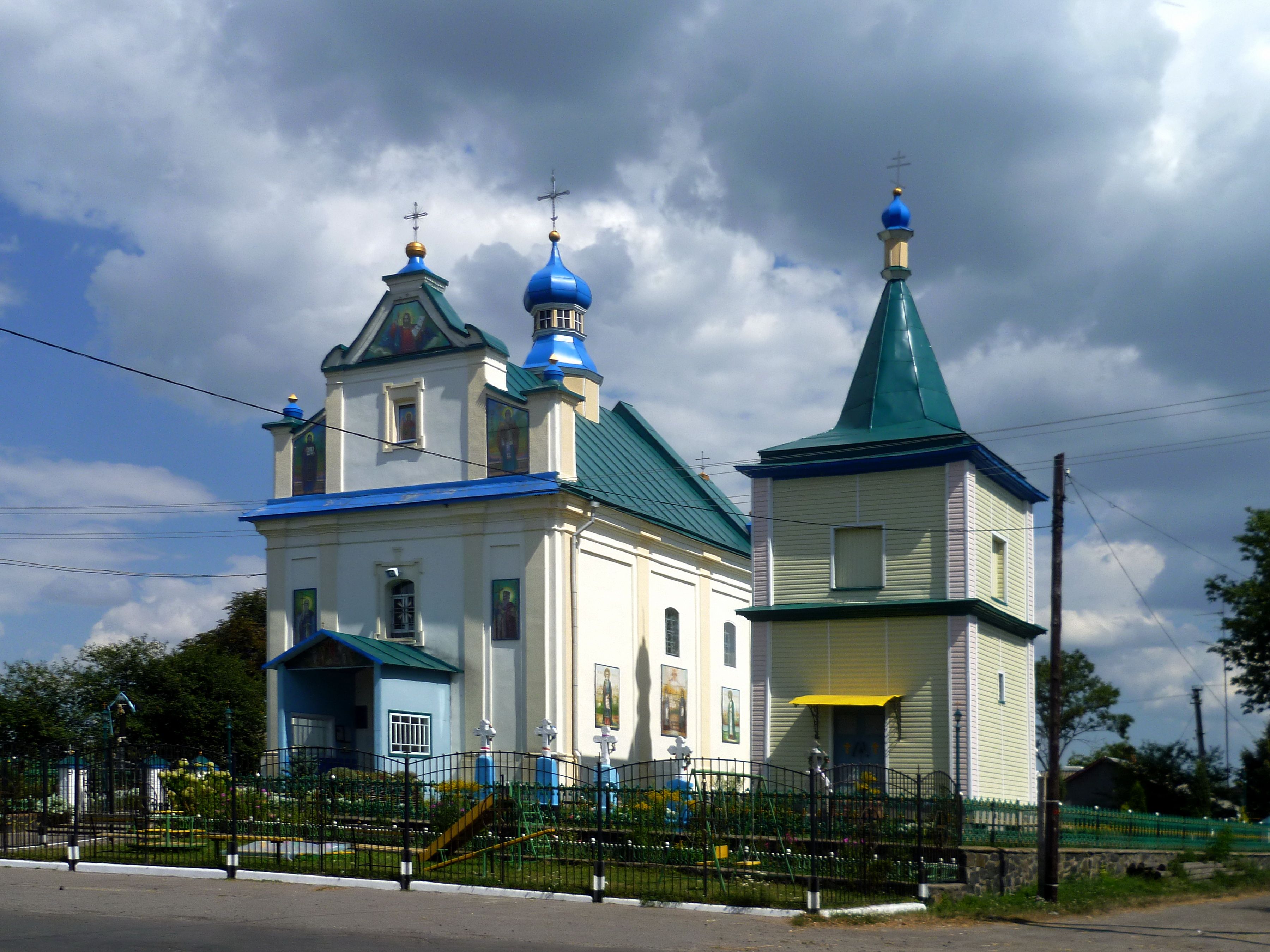 Михайлівська церква (1650 р.) - вигляд з південного заходу - с. Павлівка Іваничівський район Волинська область Україна